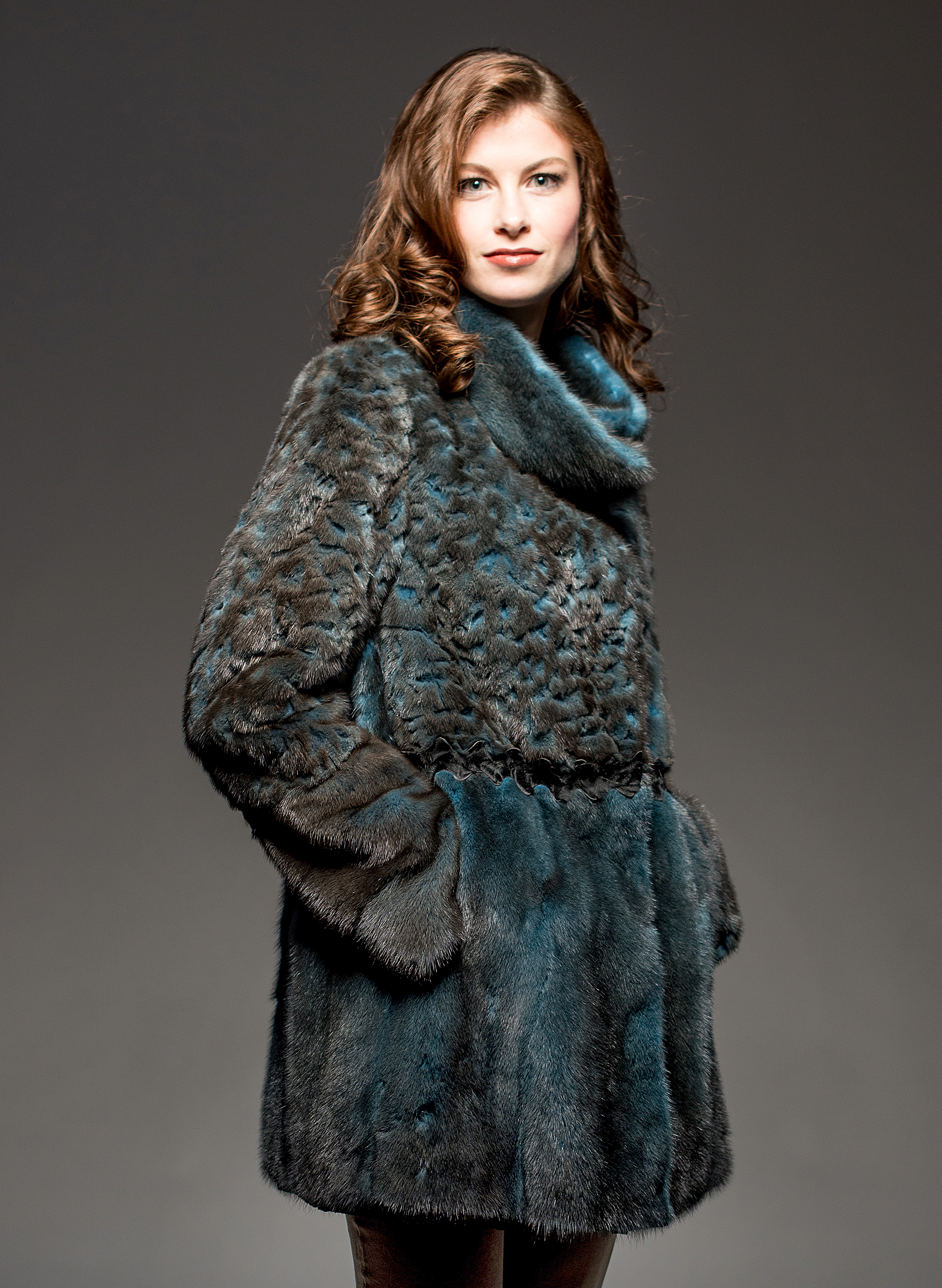 Nerz-Kurzmantel, gefärbt, gelasert. Entwurf und Ausführung: Marcus Müller Pelzdesign, Regensburg (2016).